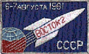 parche de la misión vostok 2